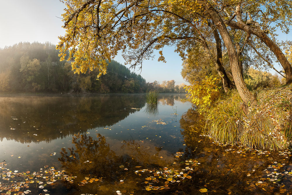 Національний природний парк «Святі Гори», Донецька область, Україна.